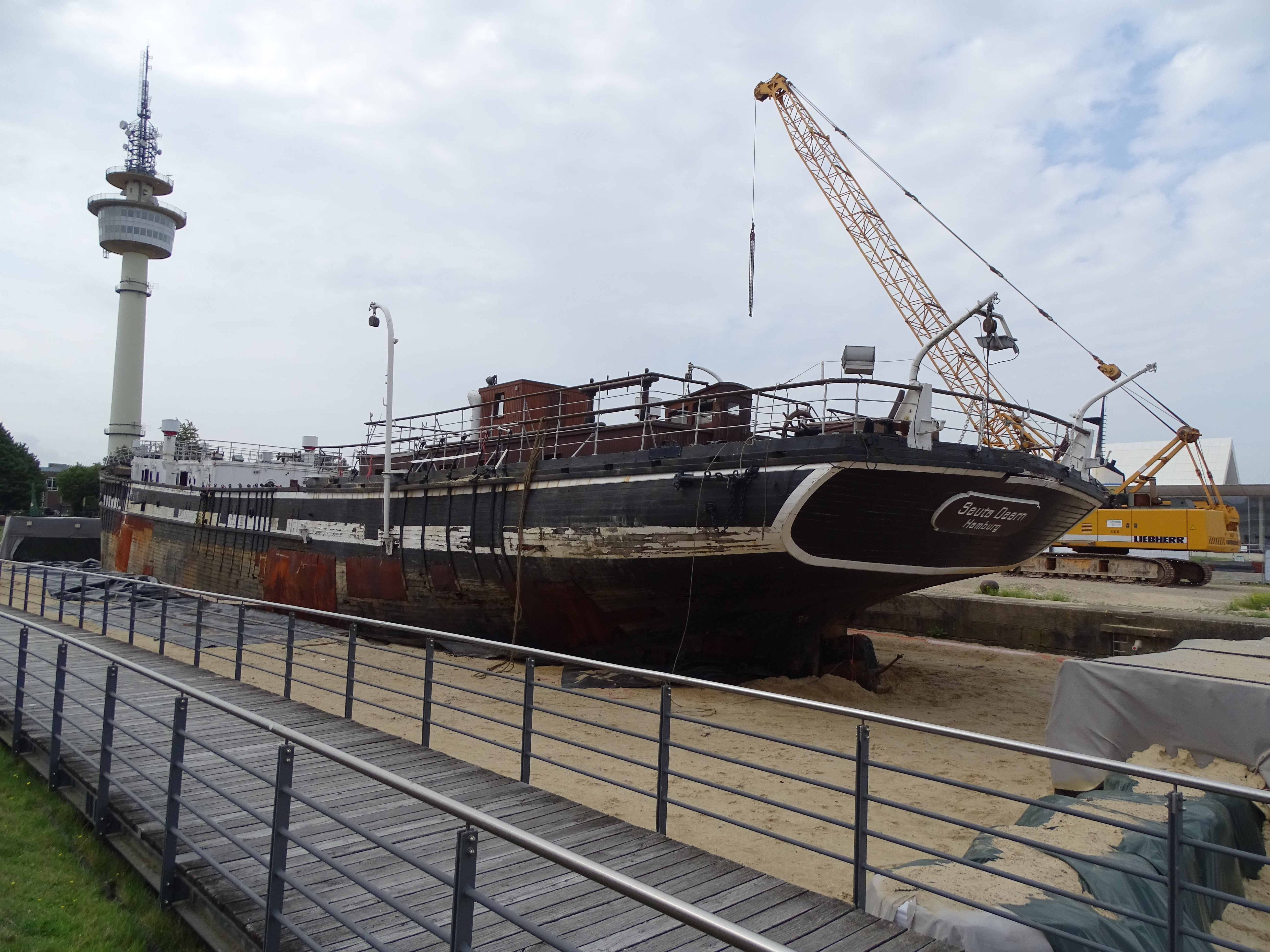 Wrack des Schiffsrumpfs der Seuten Deern im Alten Hafen von Bremerhaven